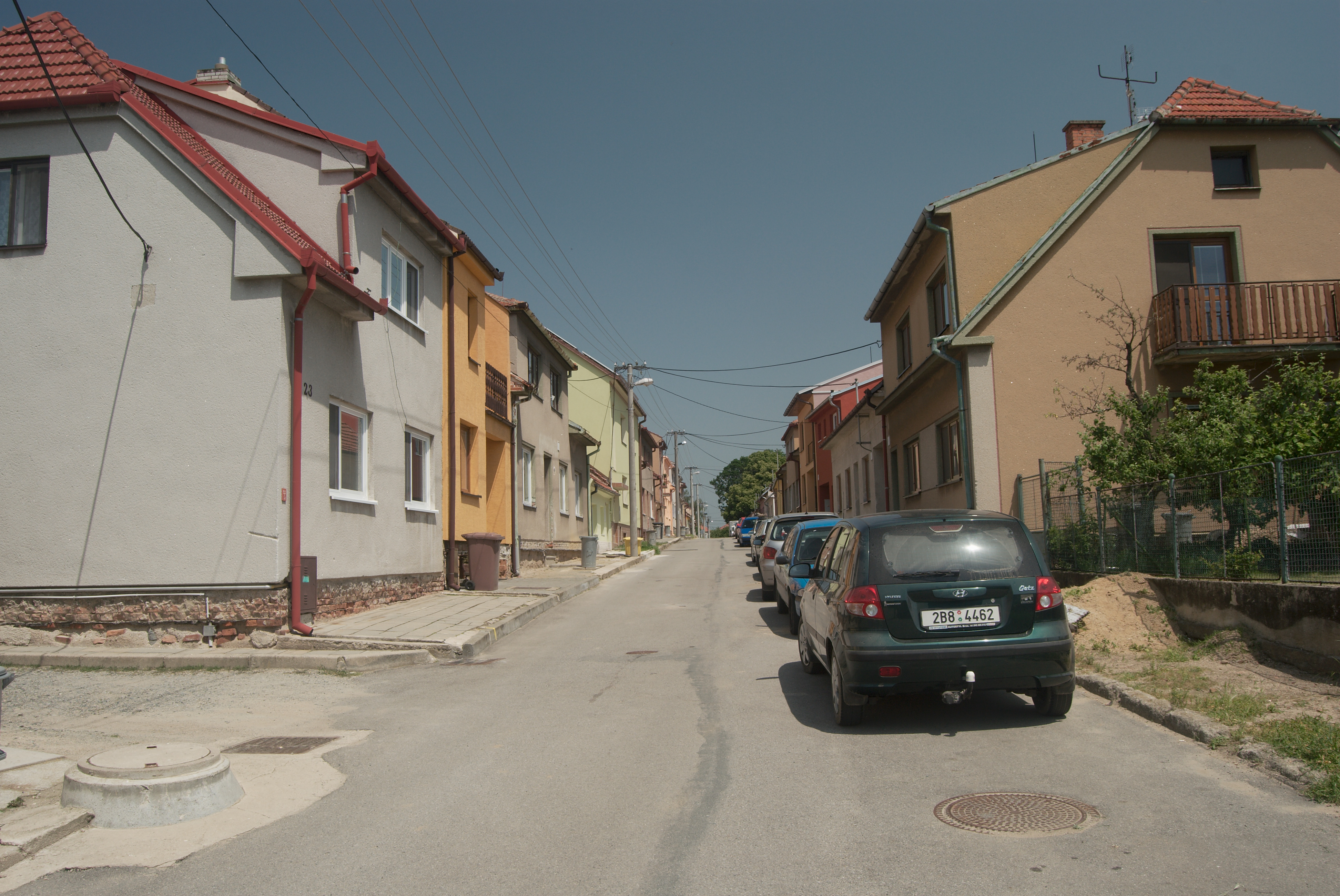 Česky: Ořechov - ulice Kerendov v bývalé obci Ořechovičky